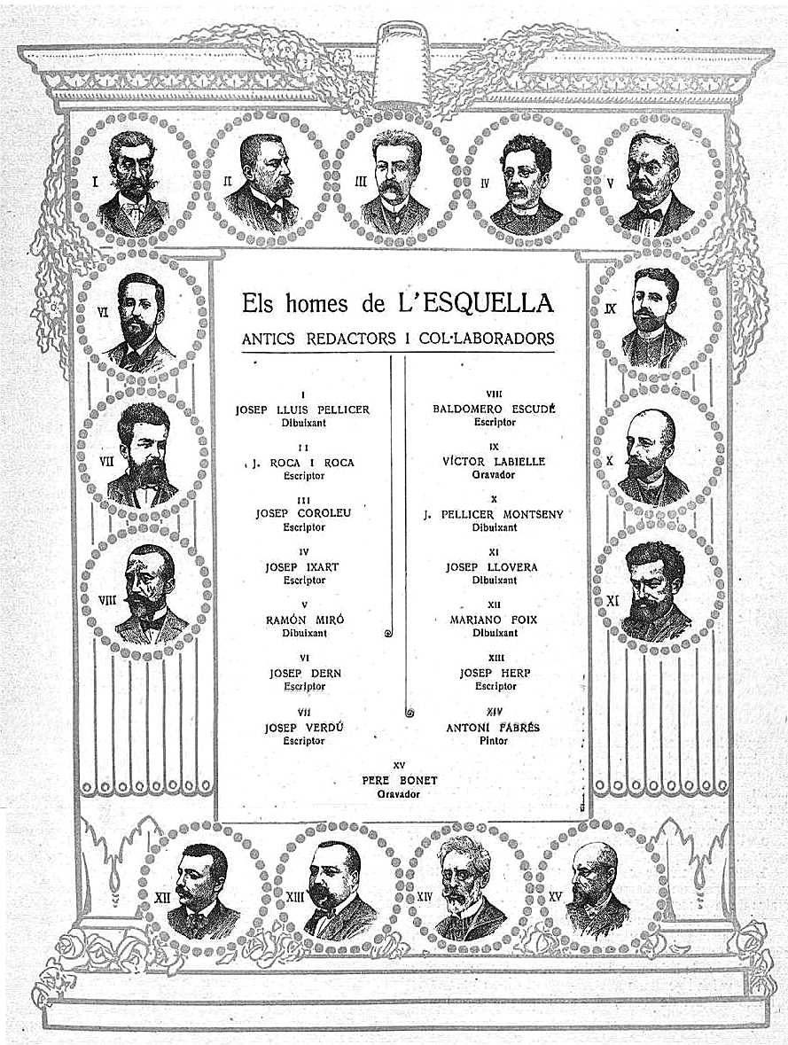 Antics redactors i collaboradors de Esquella de la Torratxa